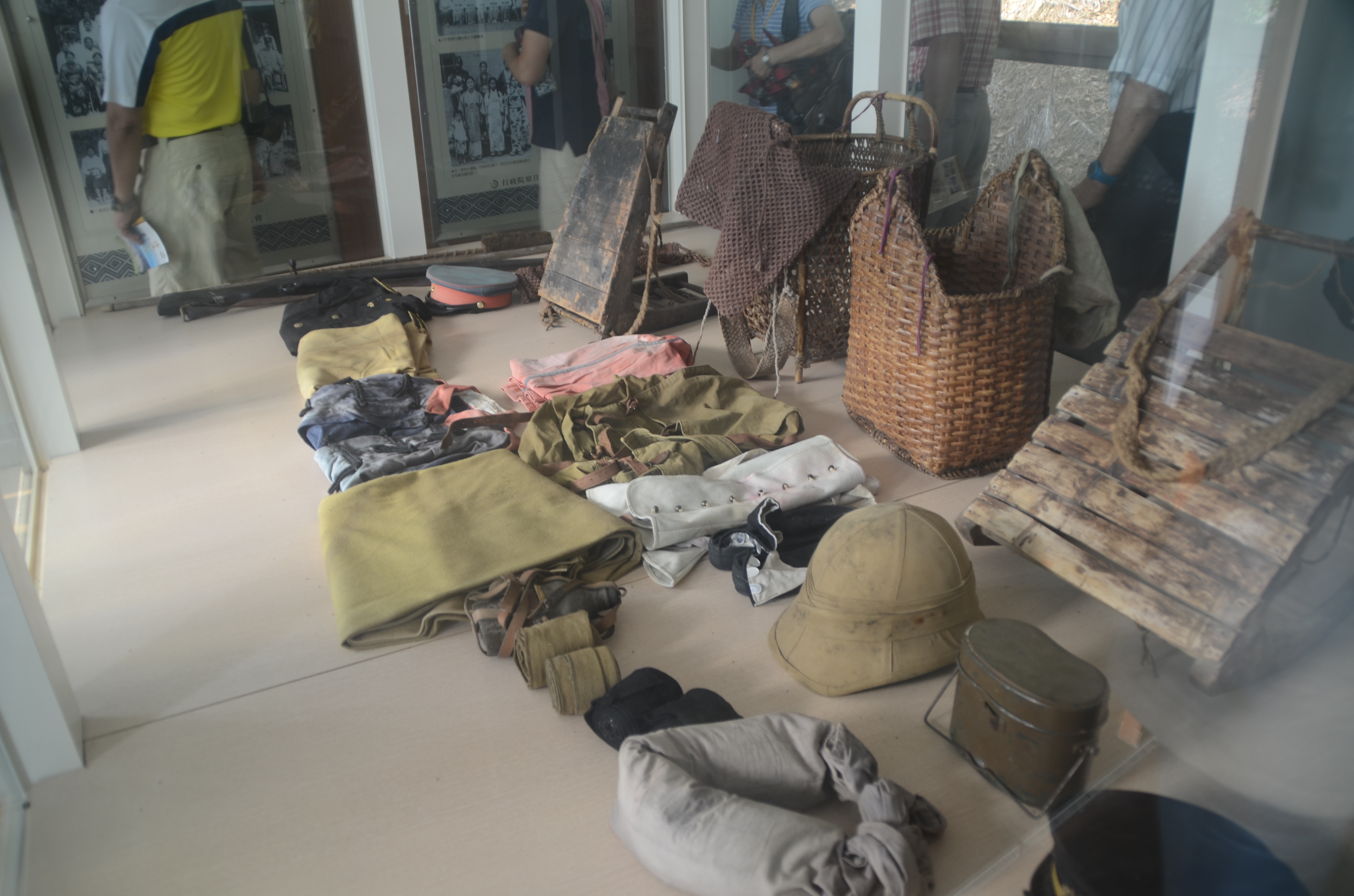 中文（台灣）: 霧社事件餘生紀念館用以紀念霧社事件的始末，與紀錄先民的遷徙歷史，於921後興建完成。